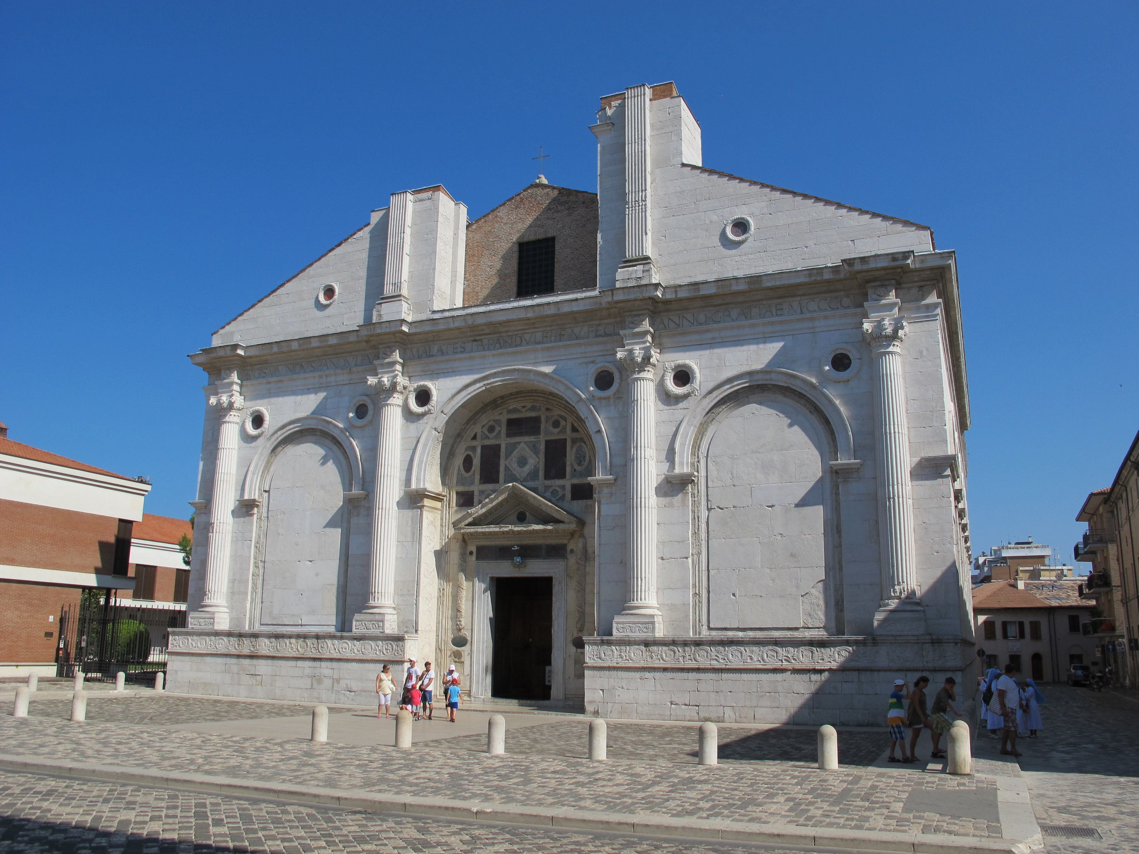 Tempio Malatestiano - MIBAC This is a photo of a monument which is part of cultural heritage of Italy.